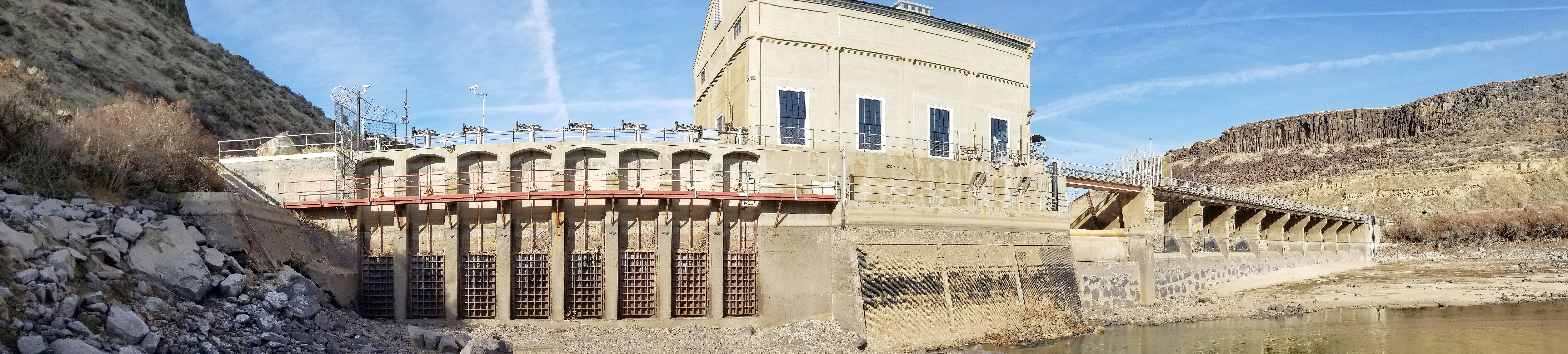 Jan 15, 2018